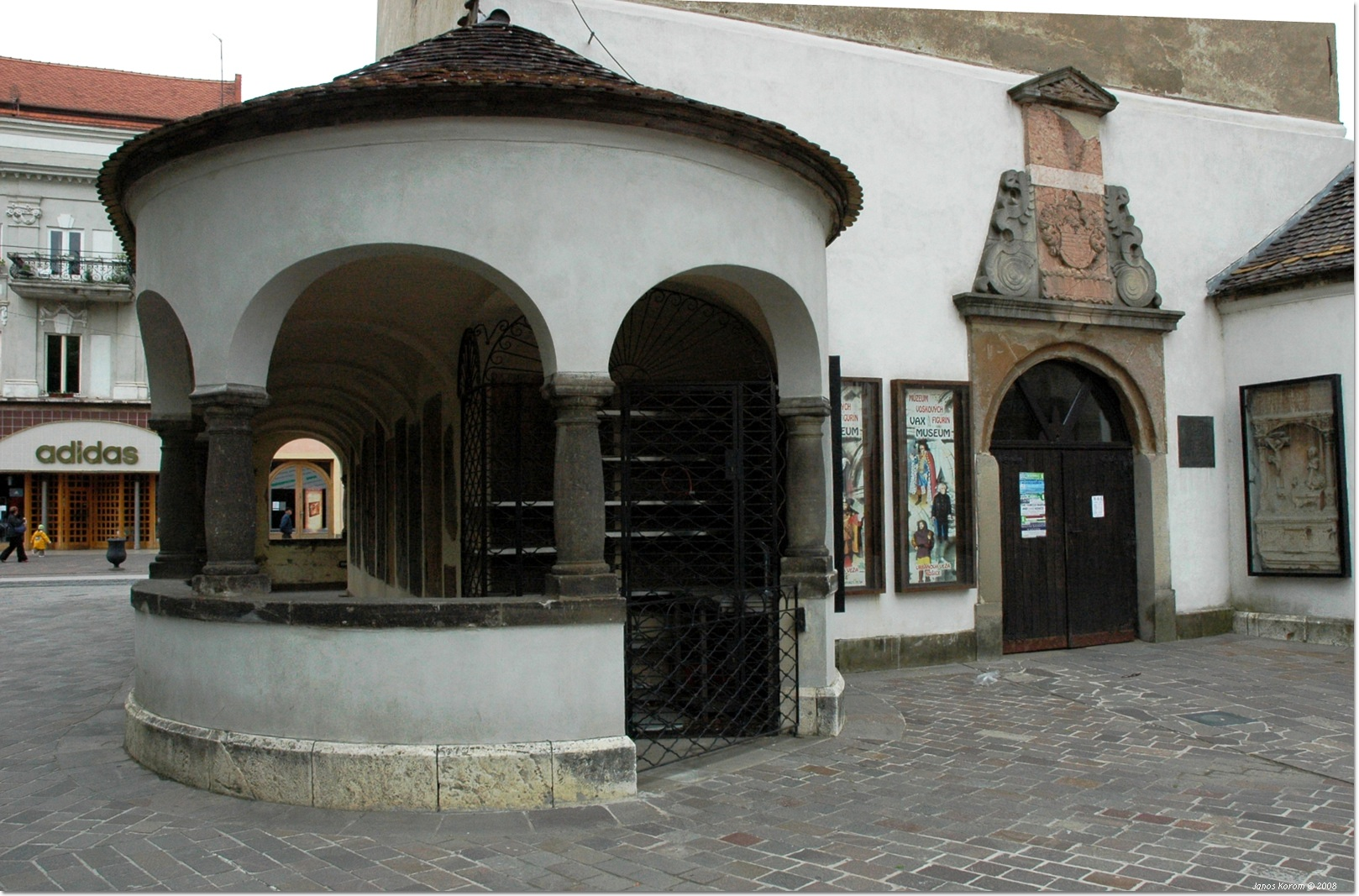 Urbanova veža